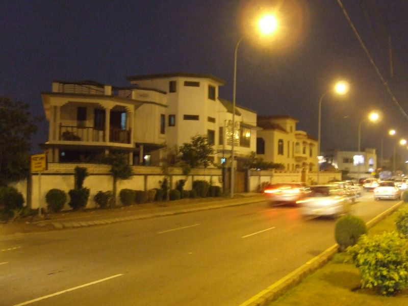 My Home - Karachi Pakistan